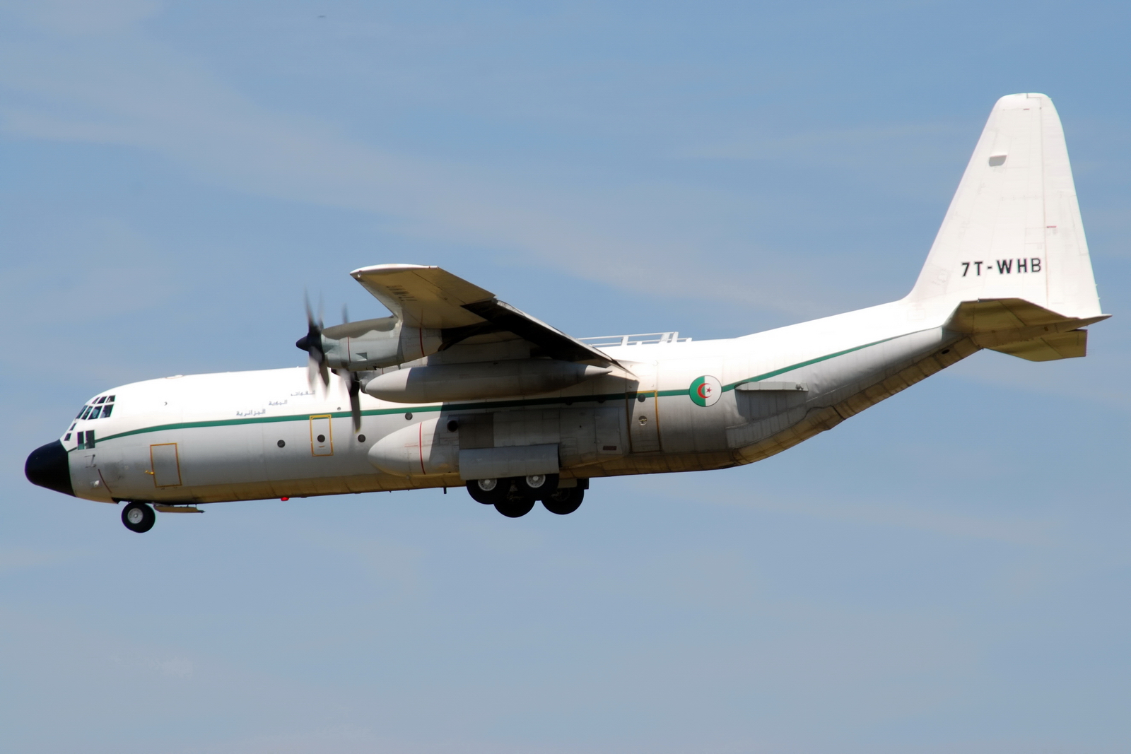 Photo prise à l'aéroport de Toulouse-Blagnac (LFBO) en France. Picture take at Toulouse-Blagnac Airport (LFBO) in France.